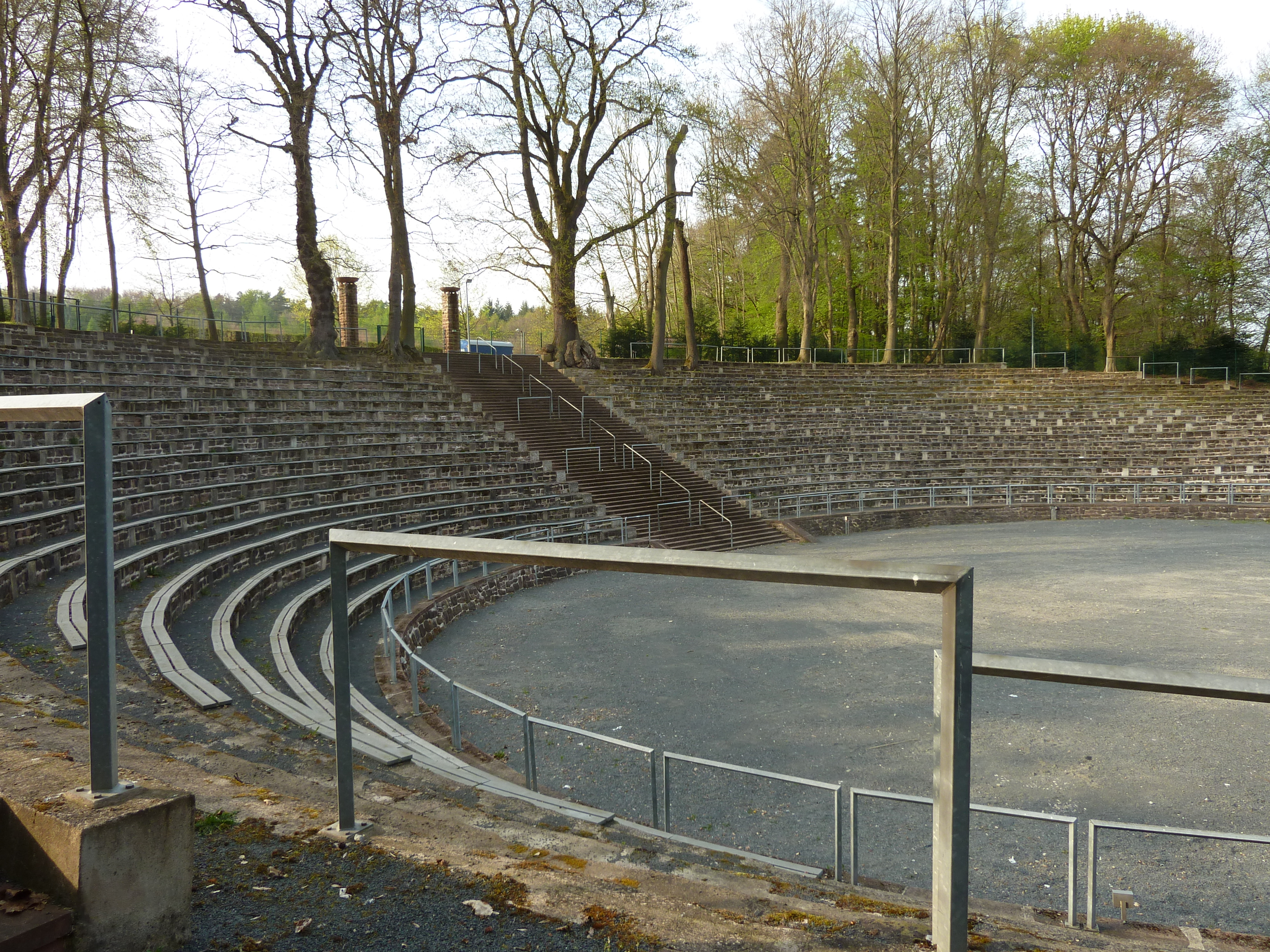 Waldbühne am Gesundbrunnen in Northeim. Erbaut in den 1930er Jahren als Thingstätte "Freilichtbühne Niedersachsen", Entwurf von Fritz Schaller